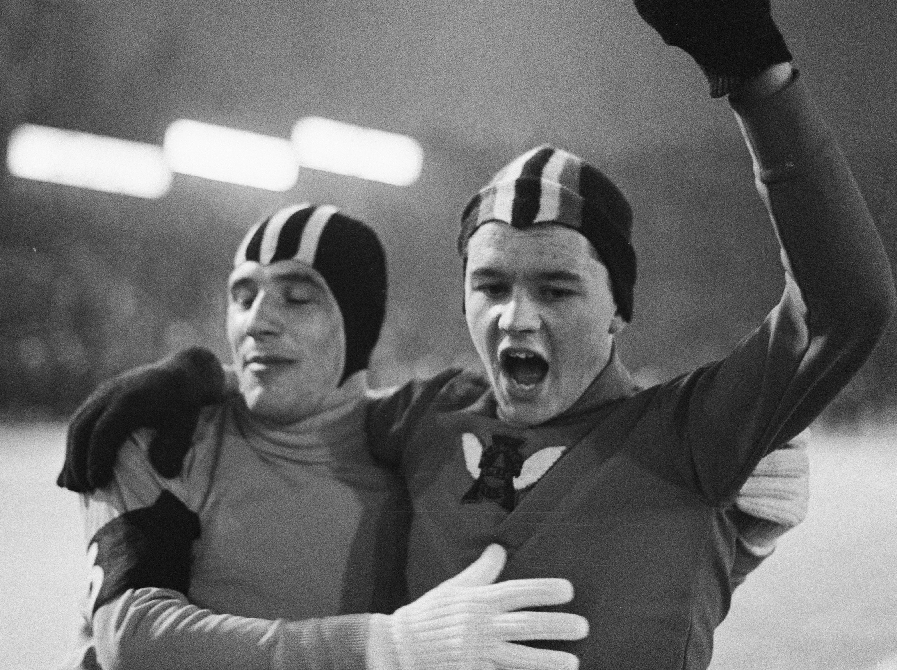 Wereldkampioenschappen schaatsen in Oslo, Kees Verkerk samen met John Tipper (Groot-Brittanië) na de 5000 meter